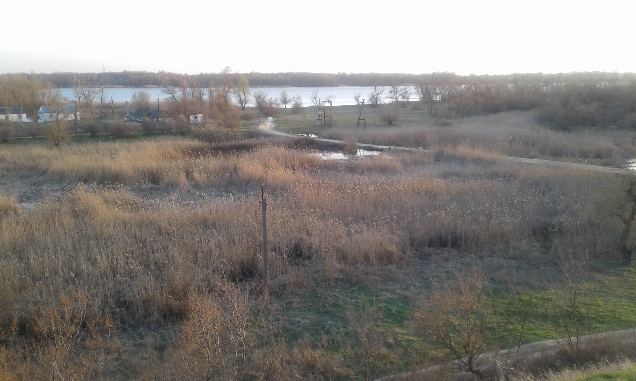 Фото со скалы